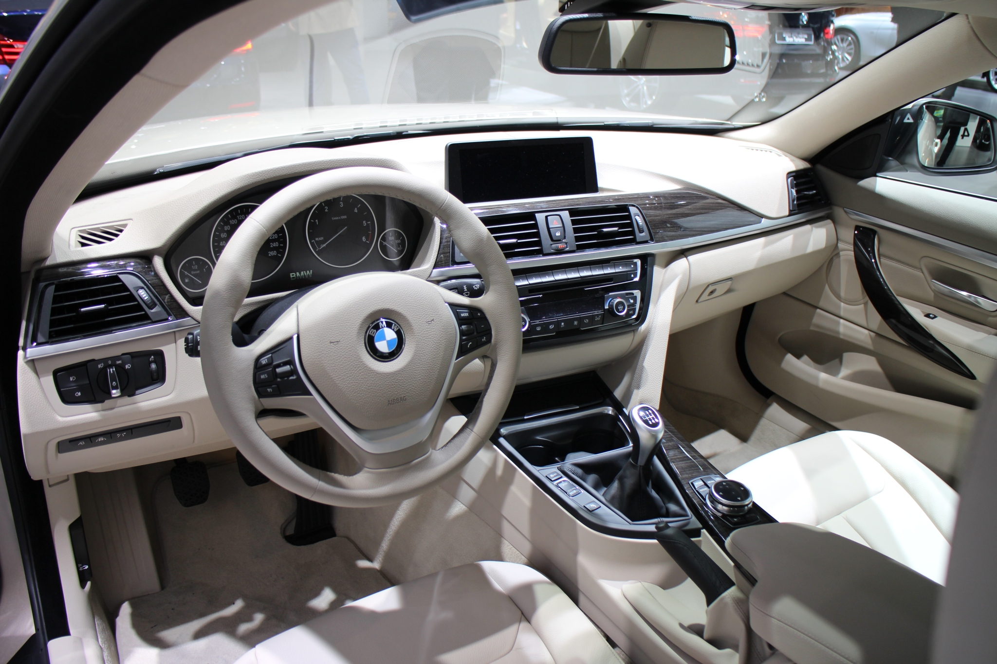 IAA 2013